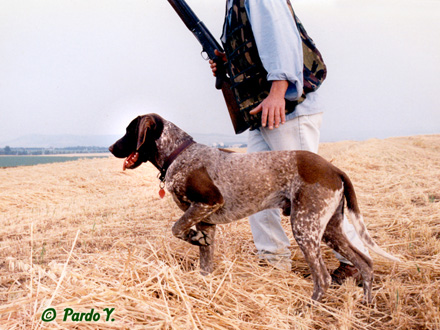 פוינטר גרמני קצר שיער בעמדת הצבעה(point), מסמן לצייד על אתור ריח של חיה לציד. צילום: יגאל פרדו